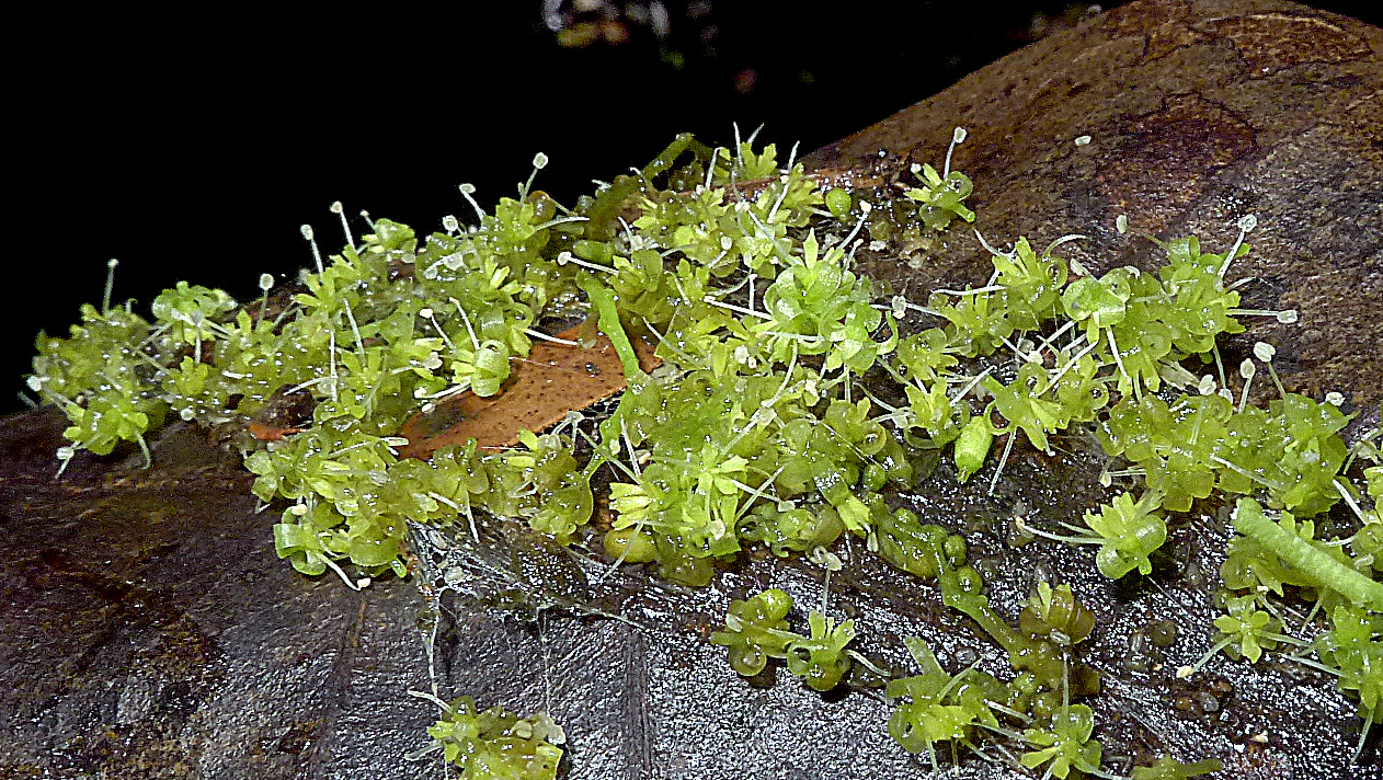 Agonandra silvatica Ducke